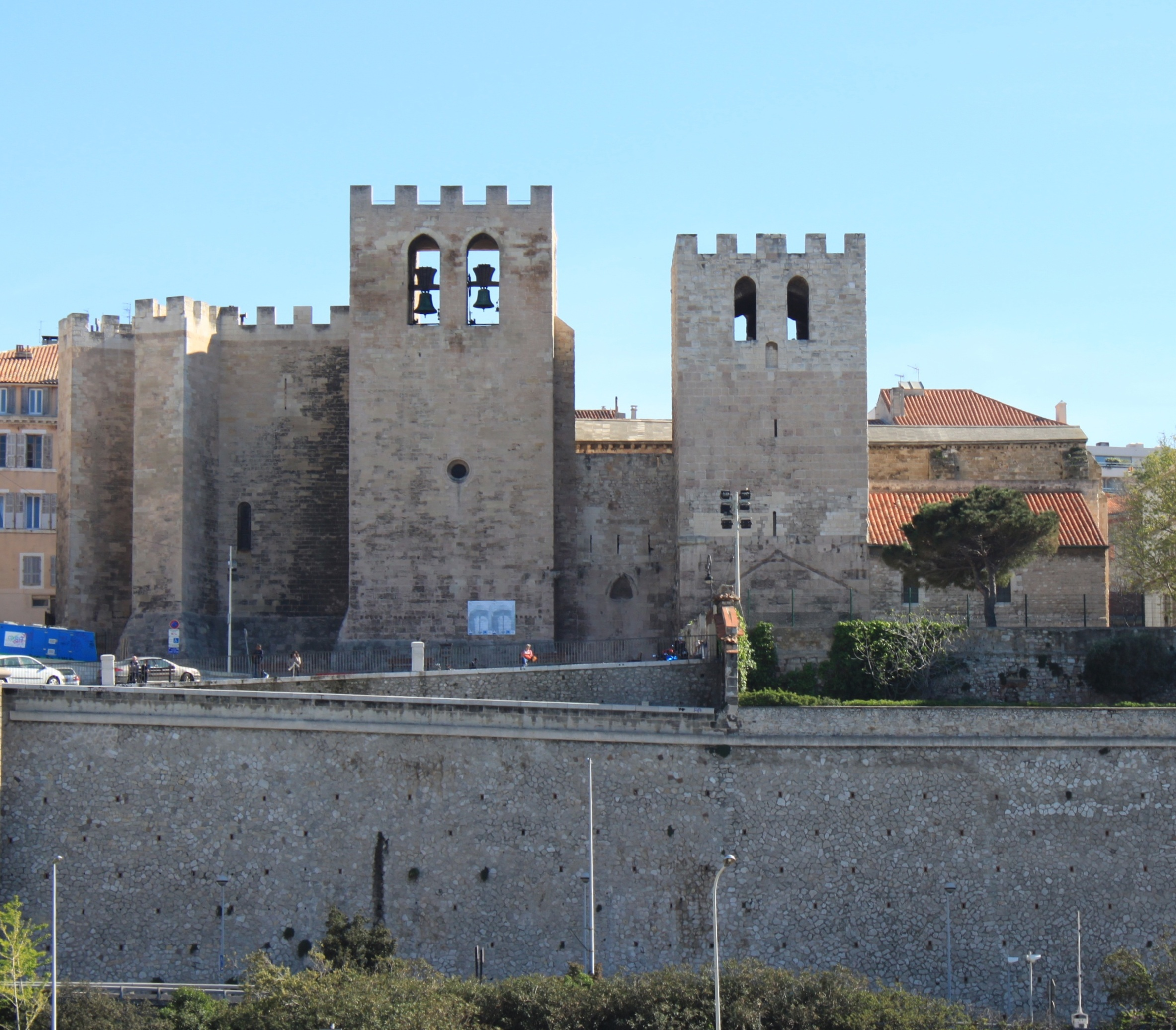 Abbaye Saint-Victor, Marseille, FRANCE